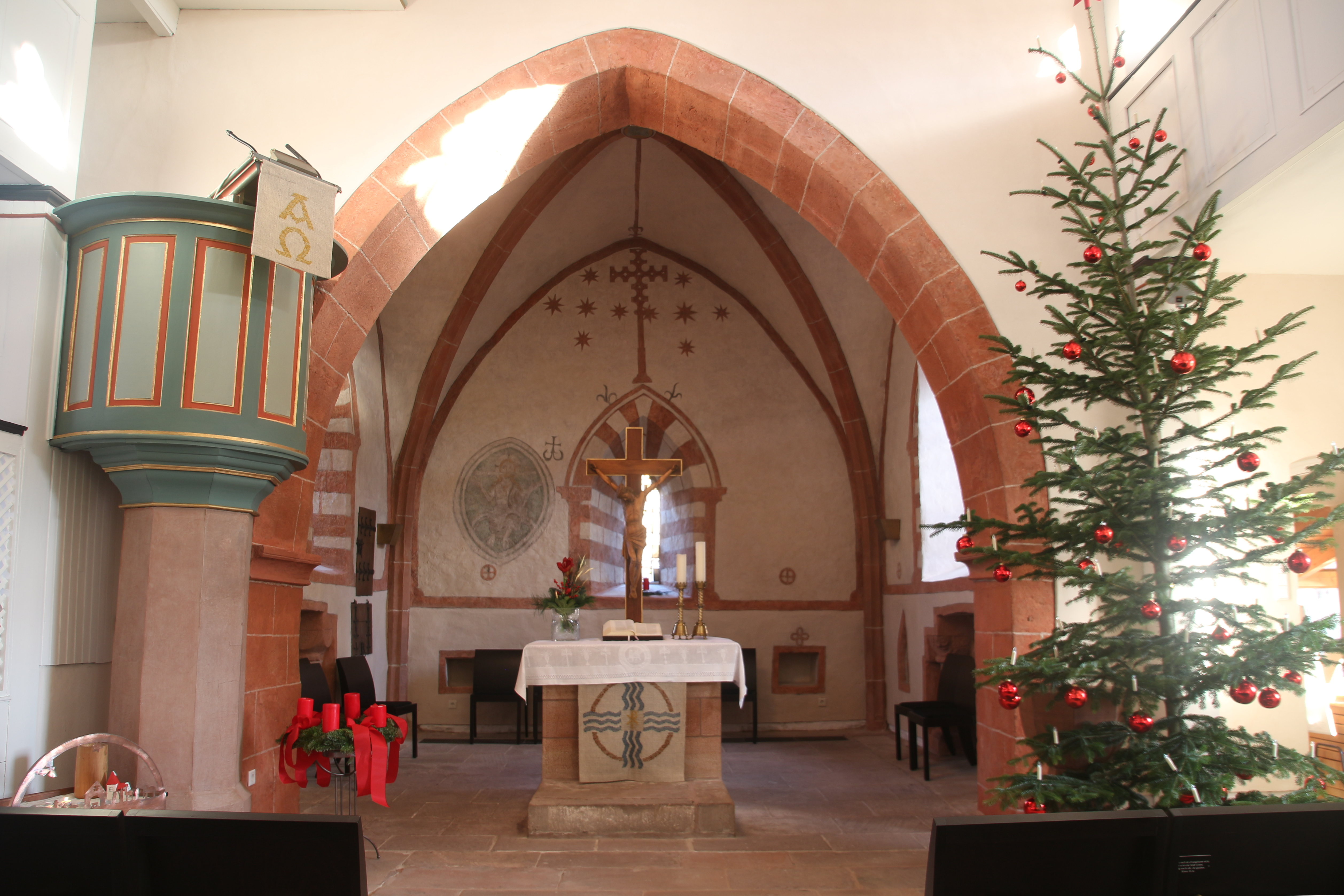 Evangelische Kirche Sterzhausen, Gemeinde Lahntal, Landkreis Marburg-Biedenkopf, Hessen